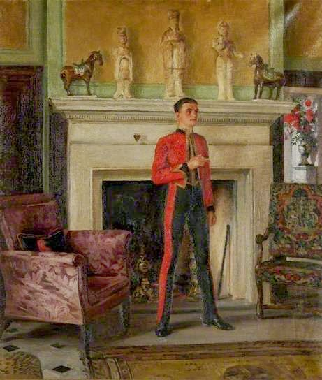 Ranken (1881-1941). Hall at Warbrook (1933).